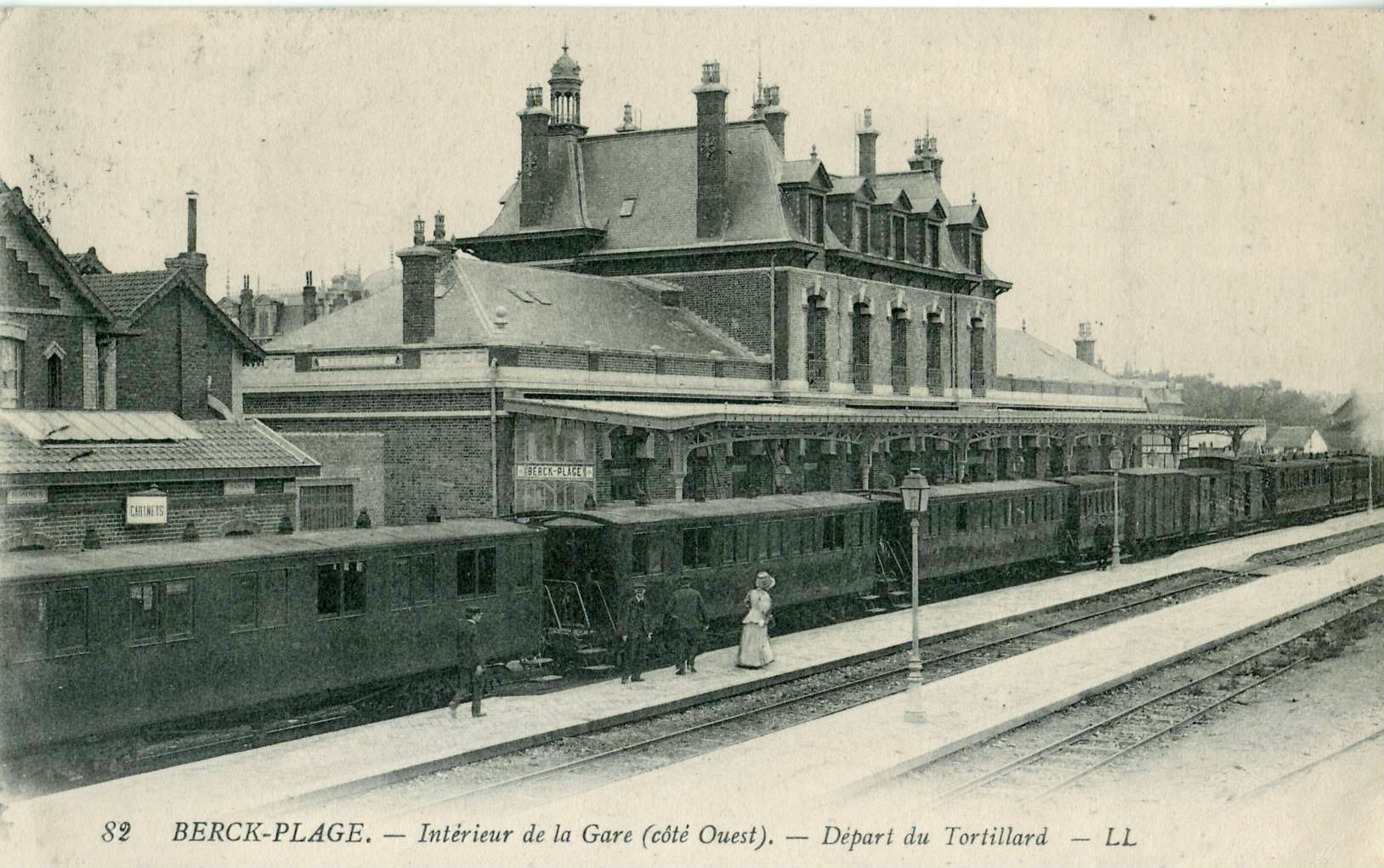 Carte postale anncienne éditée par LL, n°82 :BERCK-PLAGE - Intérieur de la Gare (côté Ouest) - Départ du Tortillard